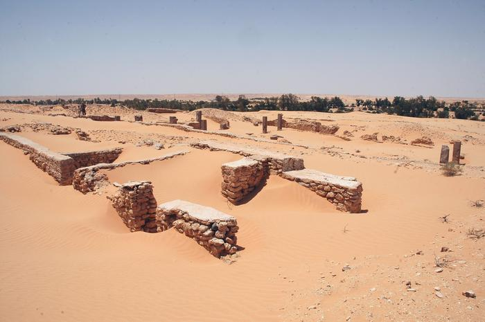 Bu Njem is een oase in Libië, bekend wegens de opgraving van het Romeinse fort Gholaia.